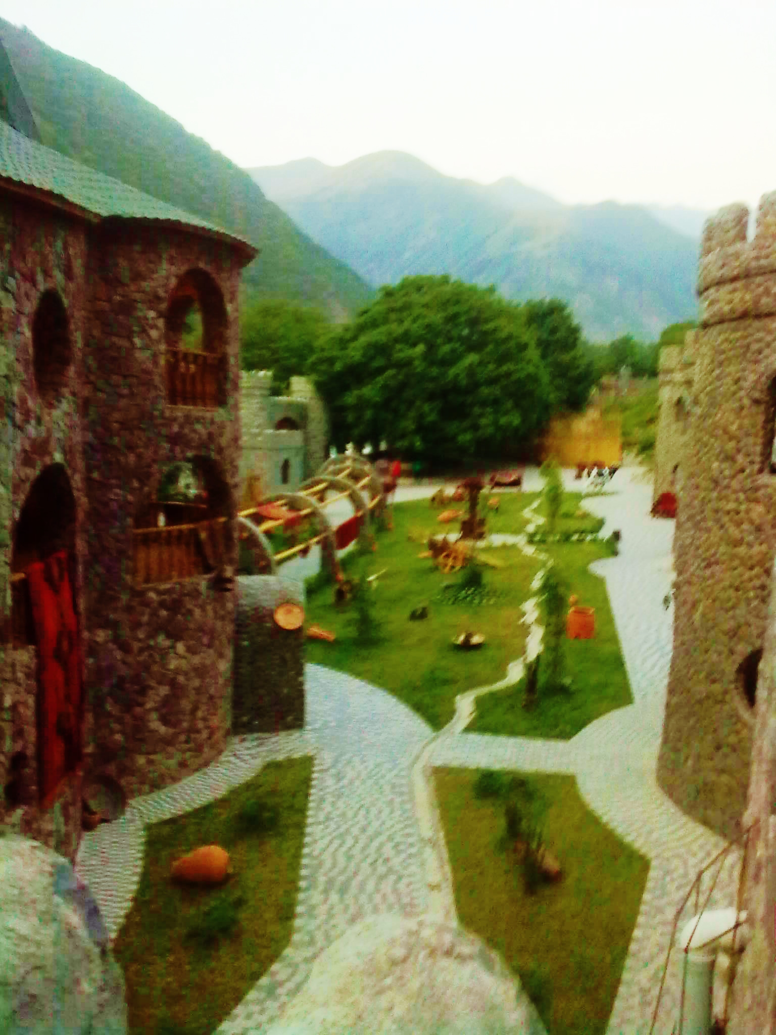 Senger qala